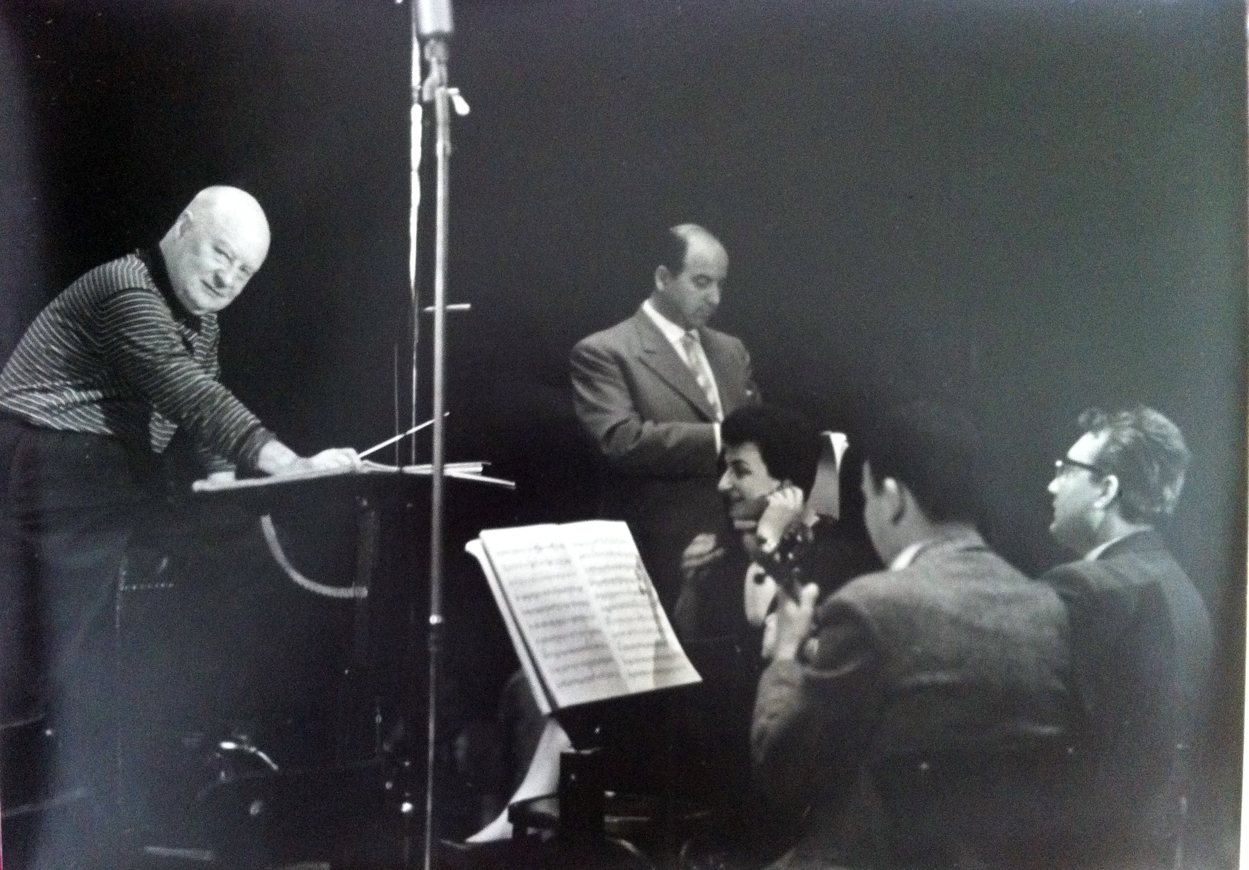 Konzert in Bremen mit Paul Hindemith